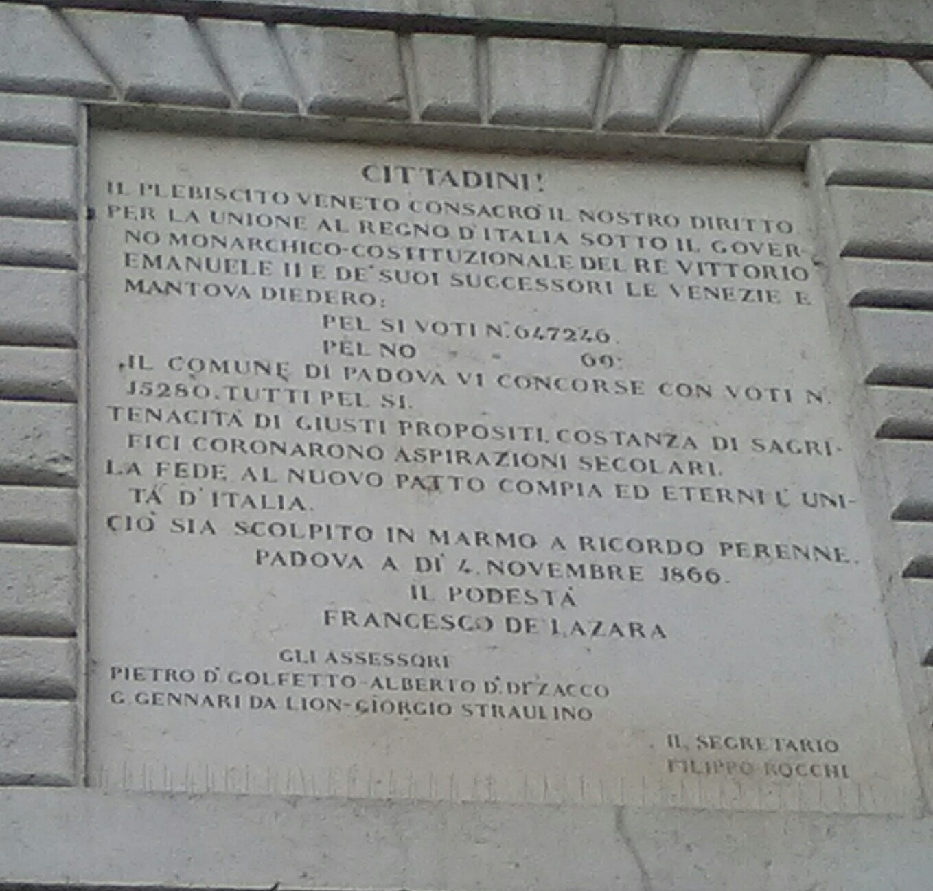 Palazzo del Podestà, piazza Erbe, Padova